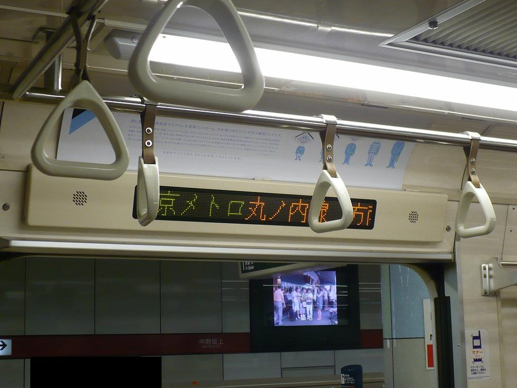 地下鉄02系の表示器